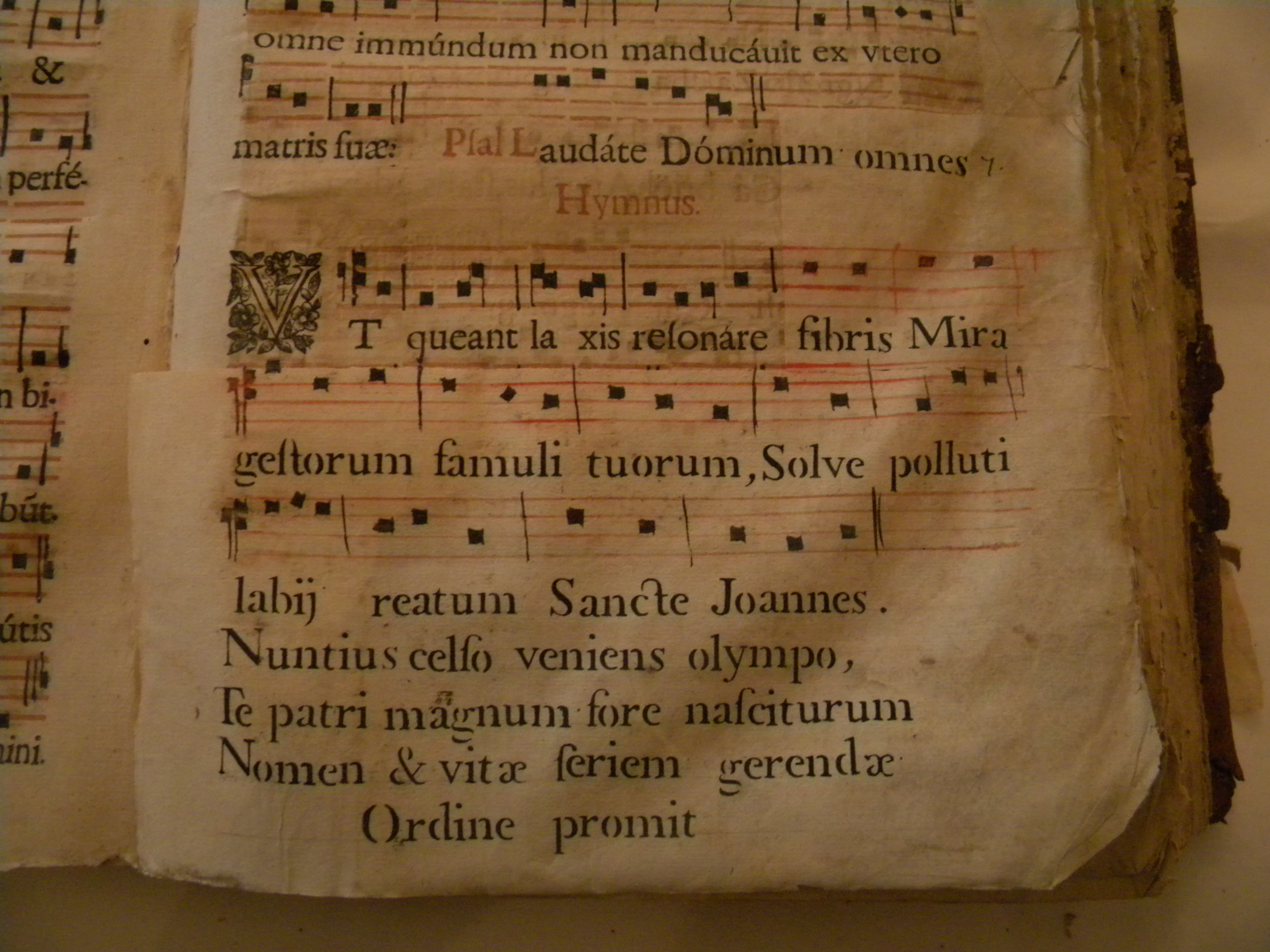 Antiphonaire (probablement XVII siècle) église Saint Martin Arcenant